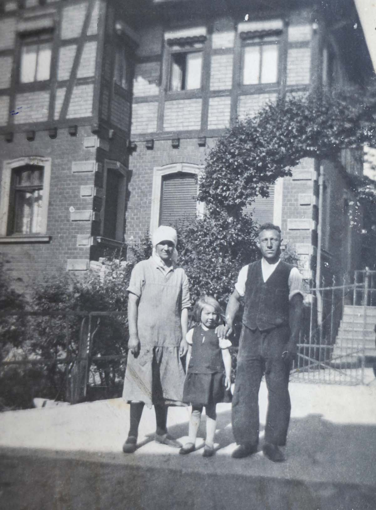 Villa Breckenheim mit Inhaberfamilie Mereis ca. 1928-1930